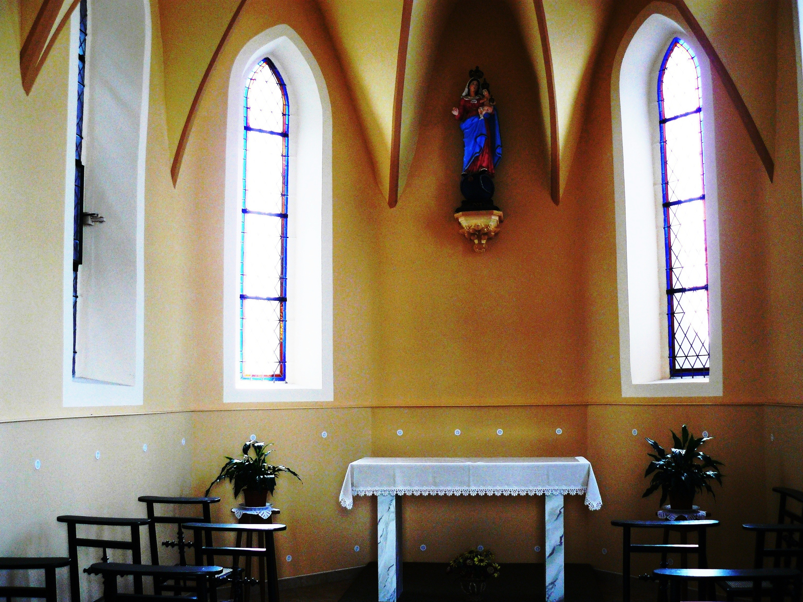 Rombach-le-Franc: Chapelle Notre Dame du Bon Secours